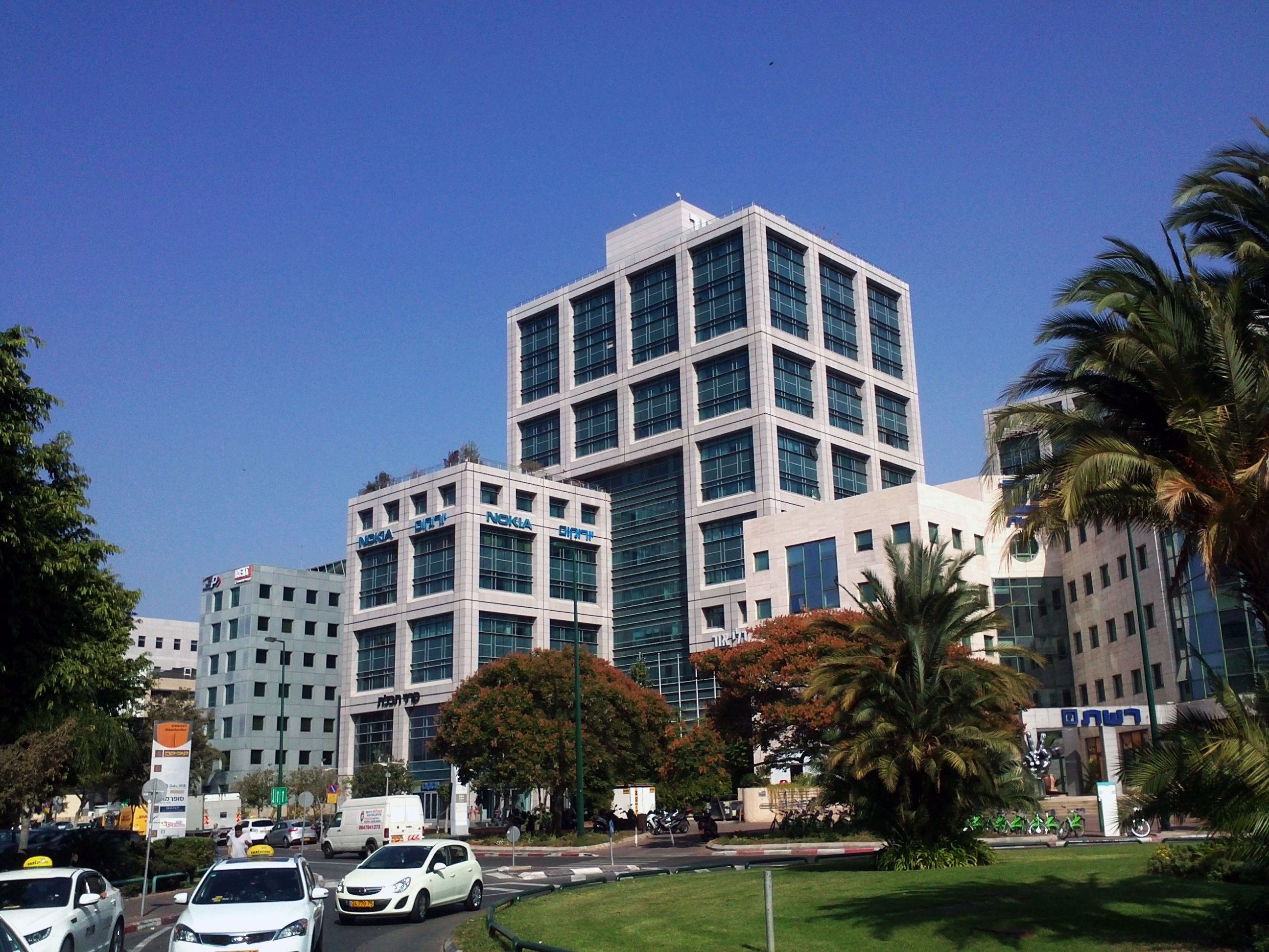 Здание Nokia, Рамат хаХаяль, Тель-Авив